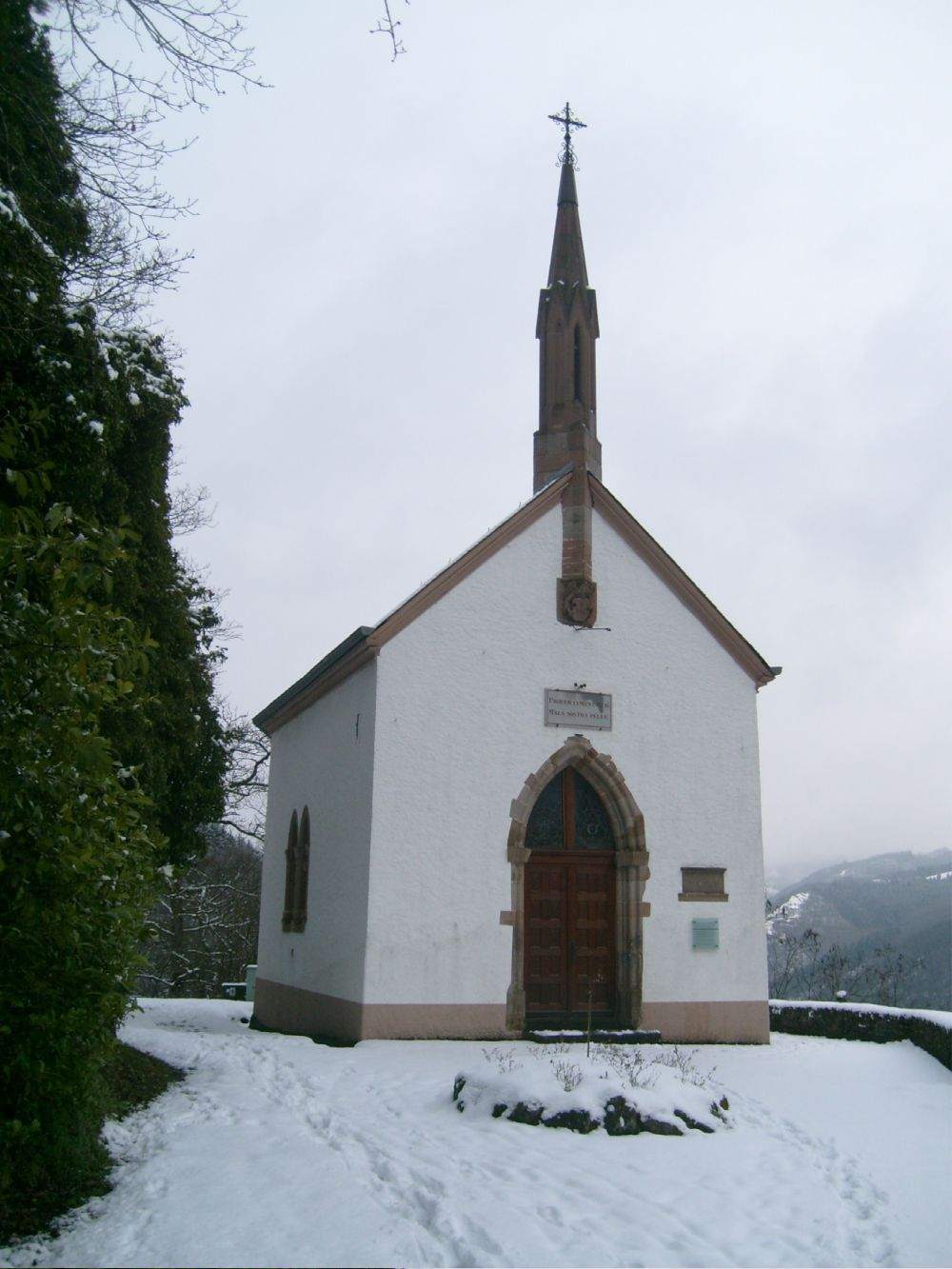 D'Veianer Bildchen, 26. Mäerz 2008